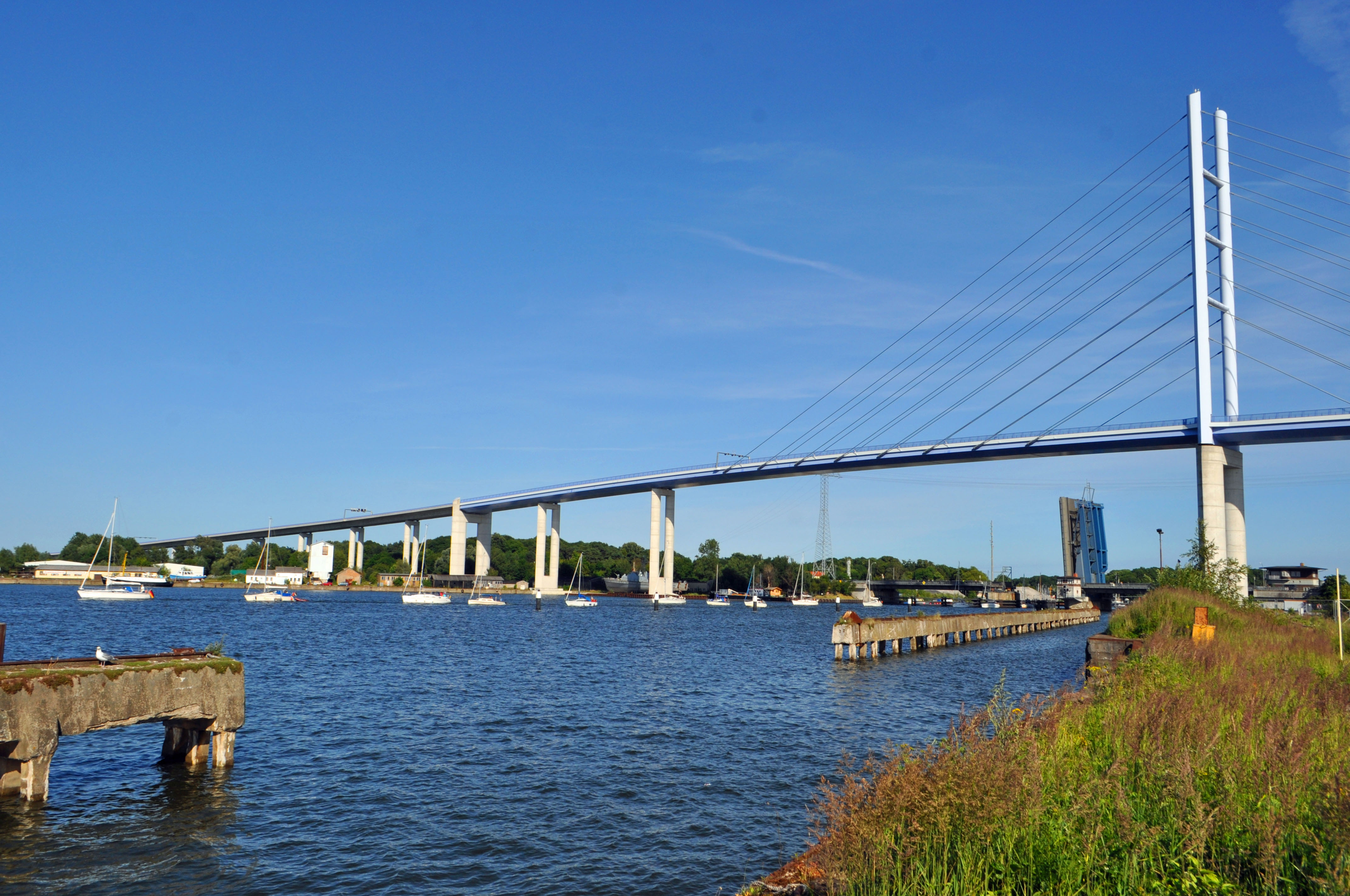 Rügenbrücke Stralsund / Ziegelgrabenbrücke